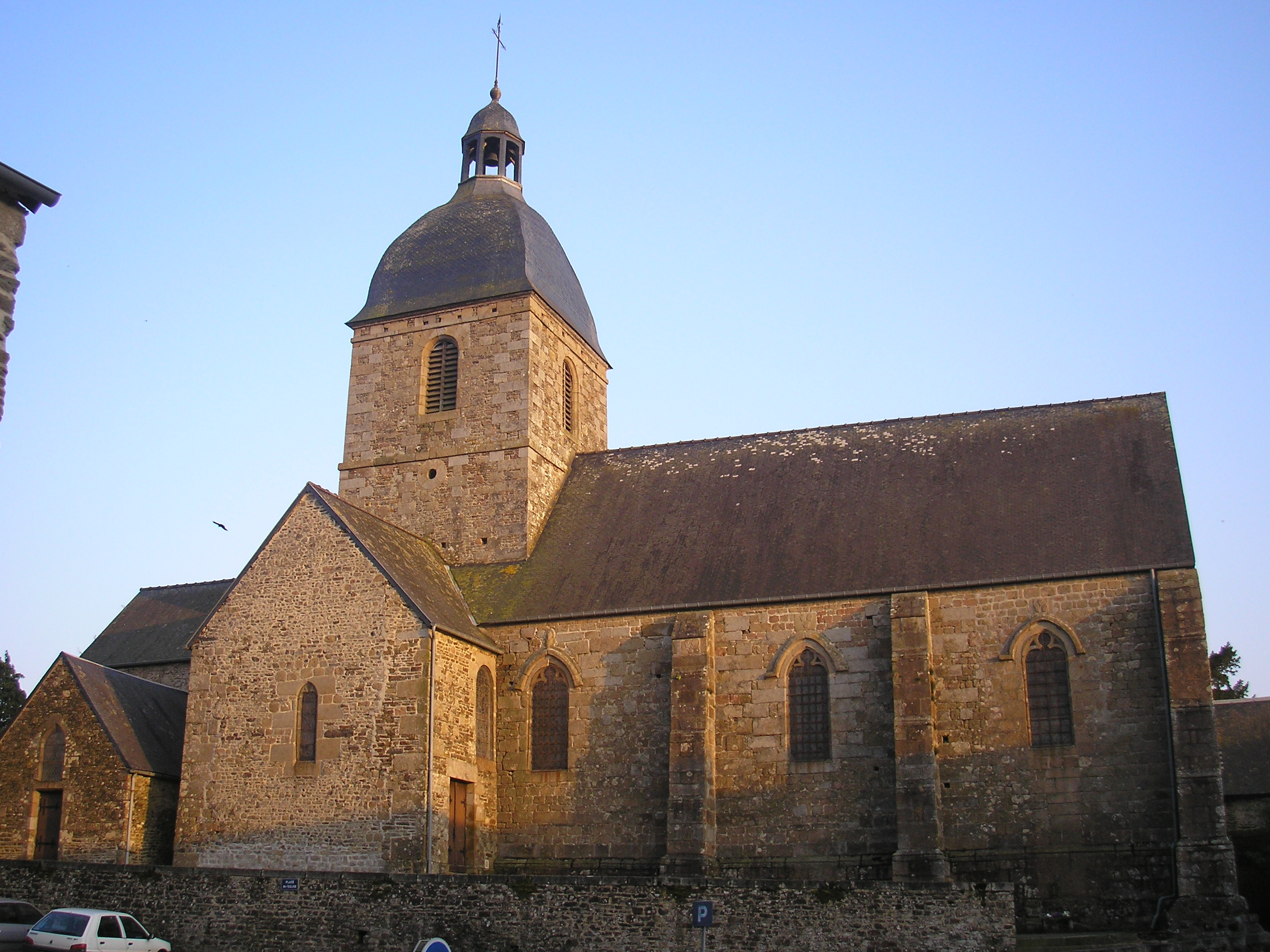 Sacey (Normandie, France). L'église Saint-Martin.